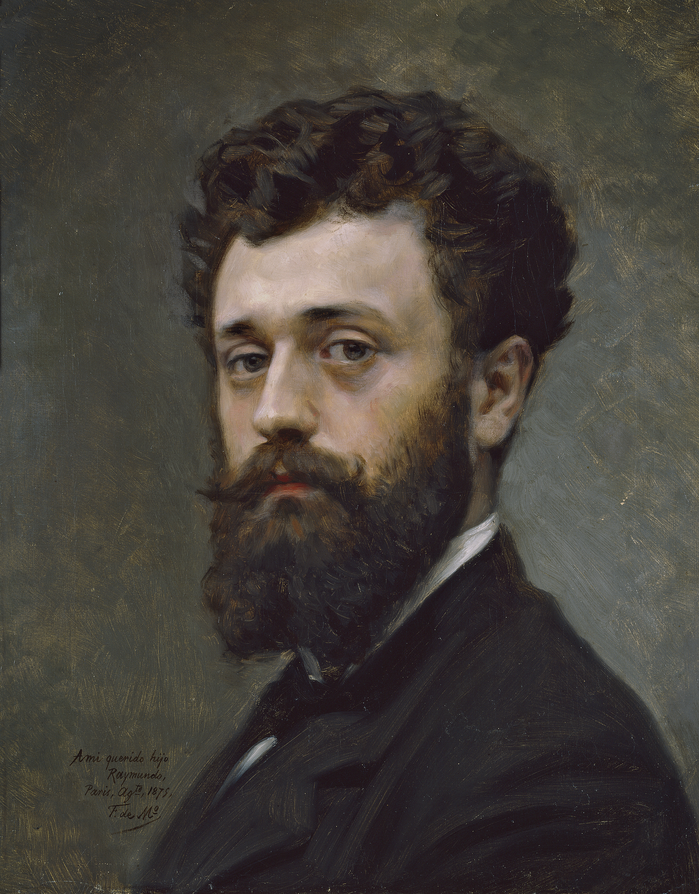 Retrato del pintor español Raimundo Madrazo (1841-1920), que fue hijo del pintor Federico de Madrazo y Kuntz.